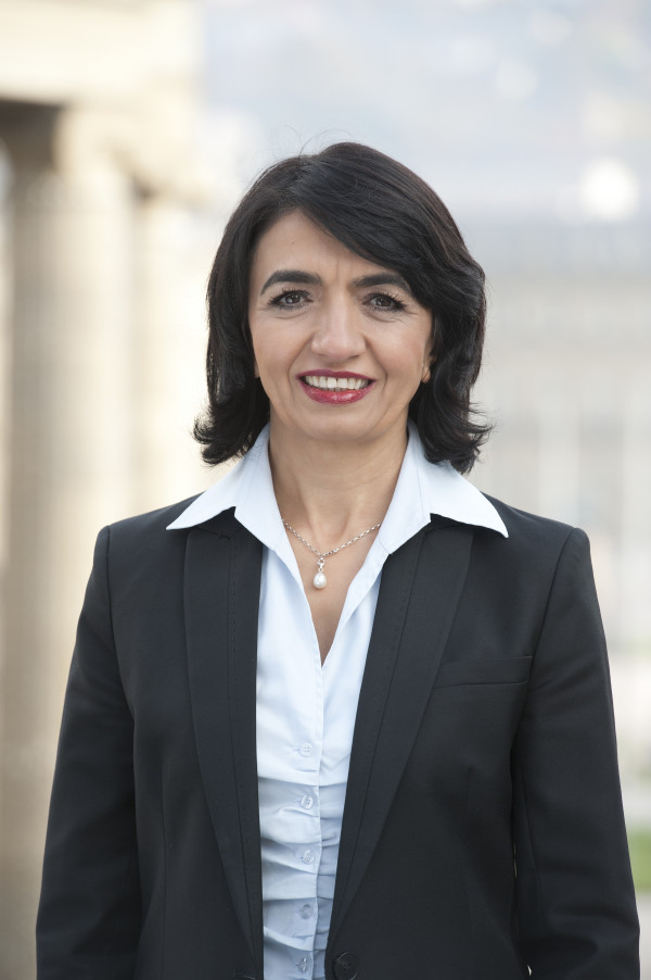 Muhterem Aras, fotografiert am 3. Nov. 2015 am Kleinen Schlossplatz in Stuttgart